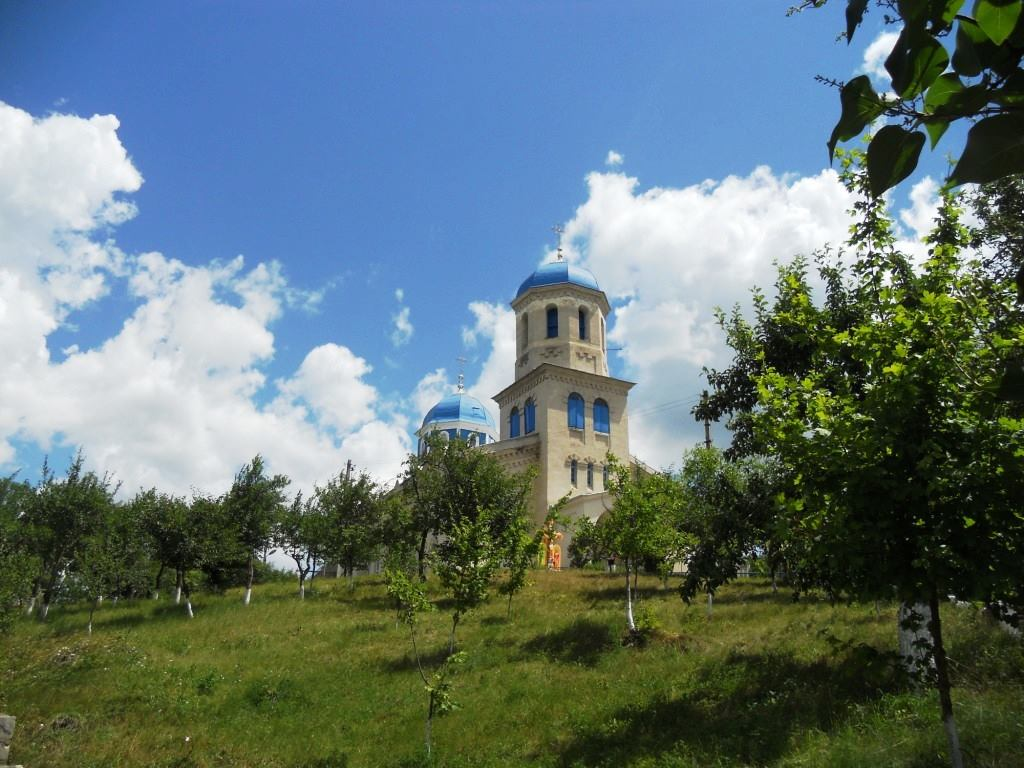 Cerkiew Opieki Matki Bożej w Drasliceni